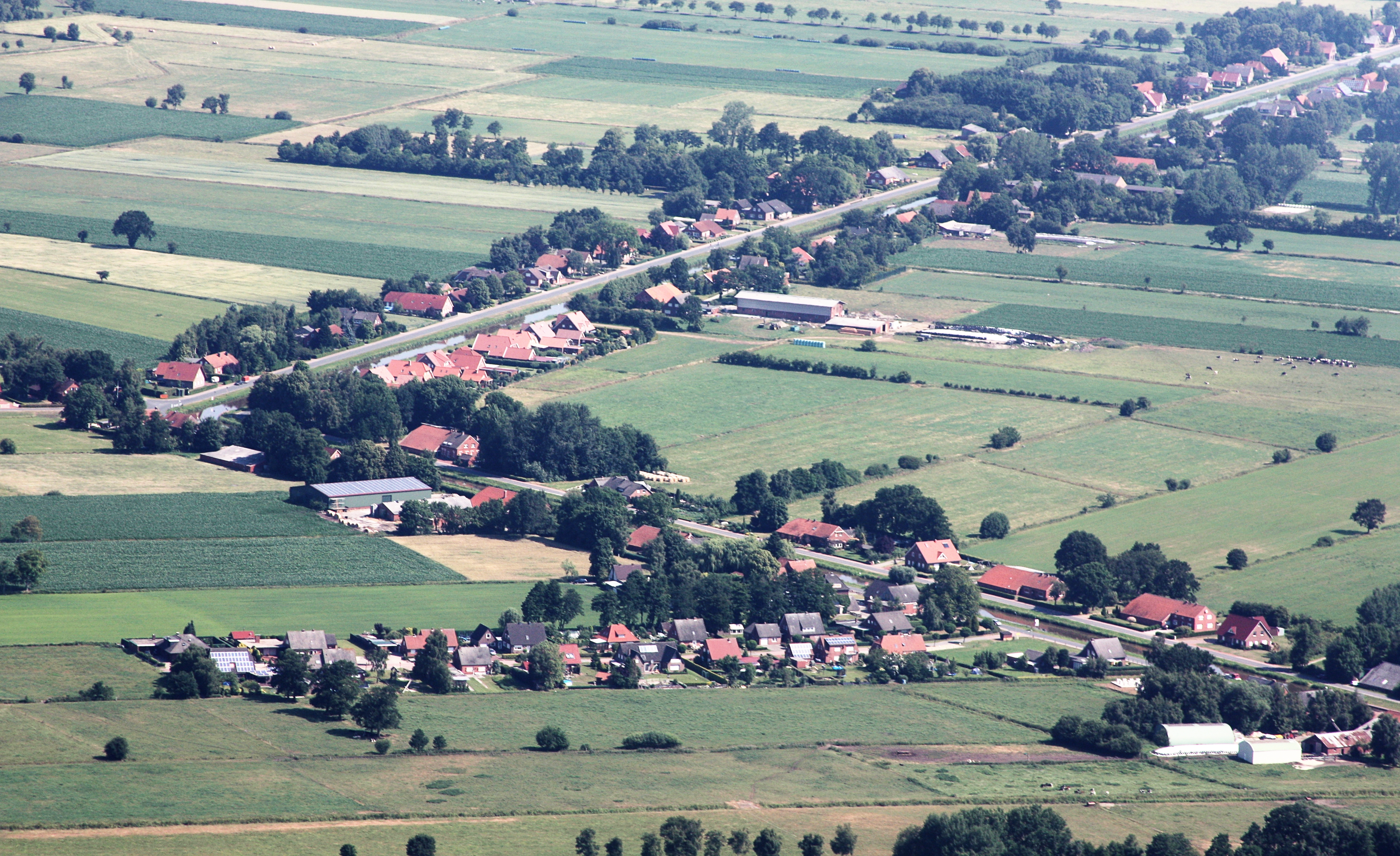 Luftaufnahme; Flug von Westerstede nach Leer; Flughöhe 1500 ft; Juli 2010; Originalfoto bearbeitet: Tonwertkorrektur und Bild geschärft mit Hochpassfilter